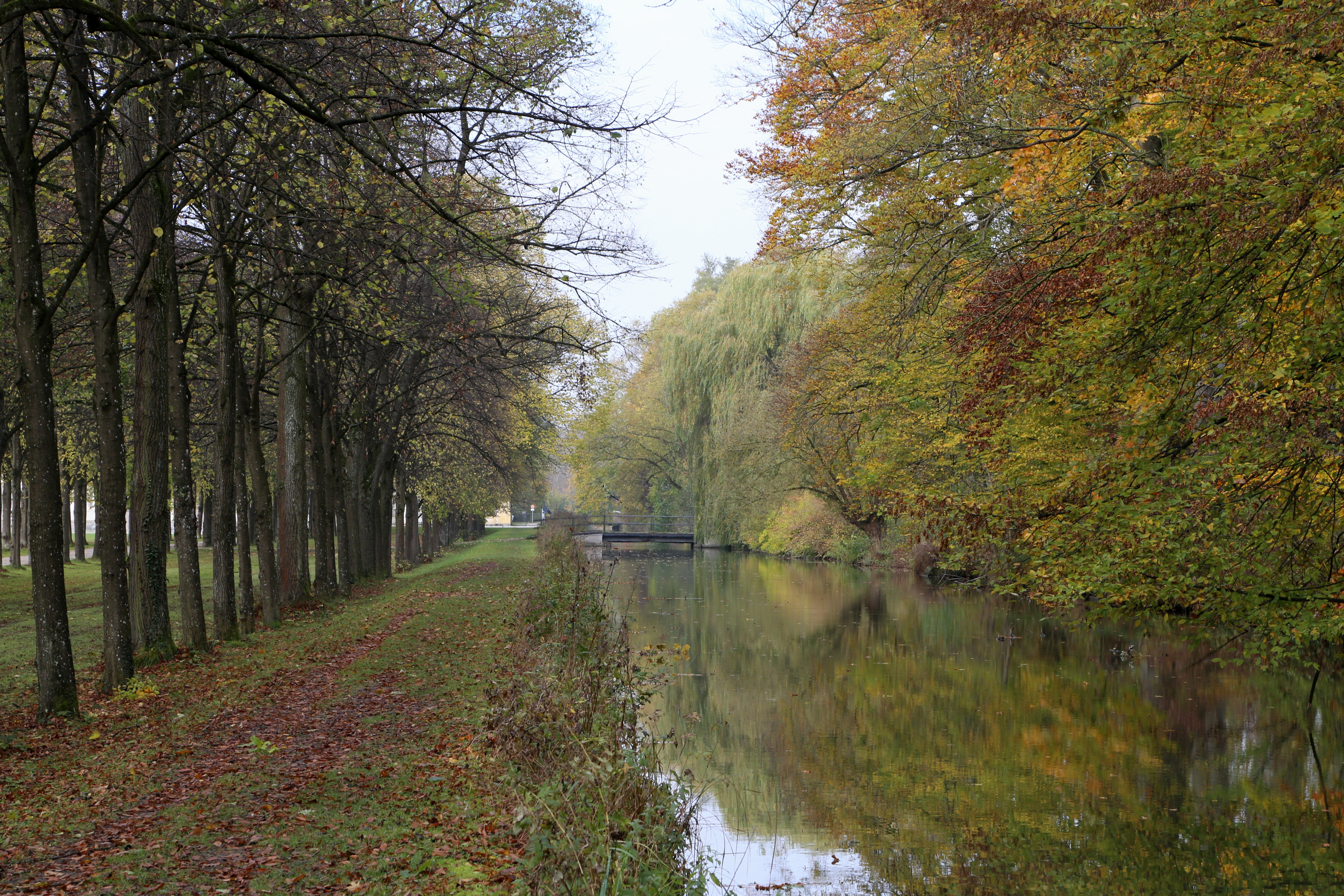 Schlossanlage Schleißheim, Hofgarten, Nördlicher Seitenkanal